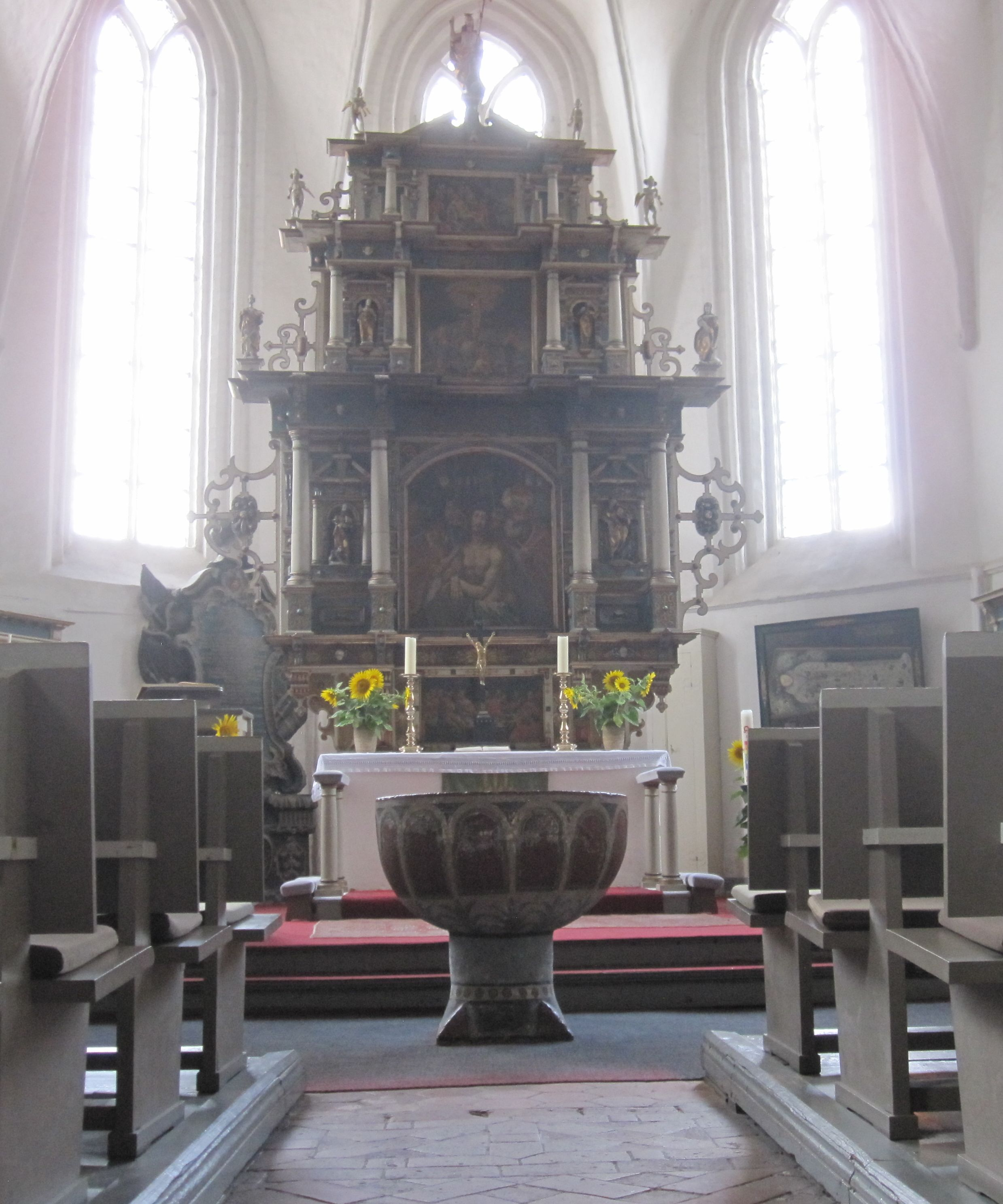 Hochaltar der Spätrenaissance aus dem Jahr 1623 von Antonius Engelhammer (auch Engelhardt) im durch fünf Spitzbogenfenster erleuchteten Chorraum, vor dem Altar der Taufstein, spätromanisch aus dem 13. Jahrhundert.